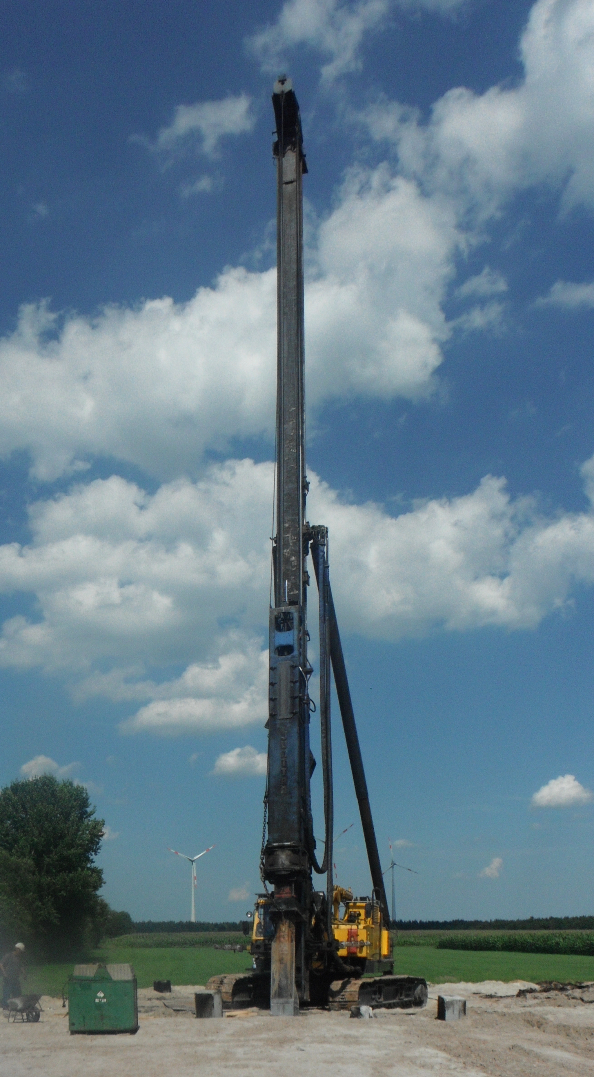 Bei Wiesmoor, Schlagramme, Unternehmen CentrumPfähle Hamburg